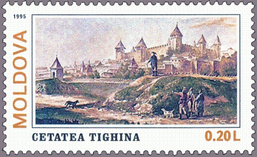 Бендерская крепость